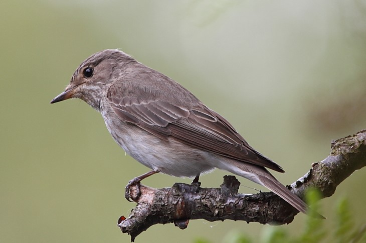 Art i fluesnapperfamilien